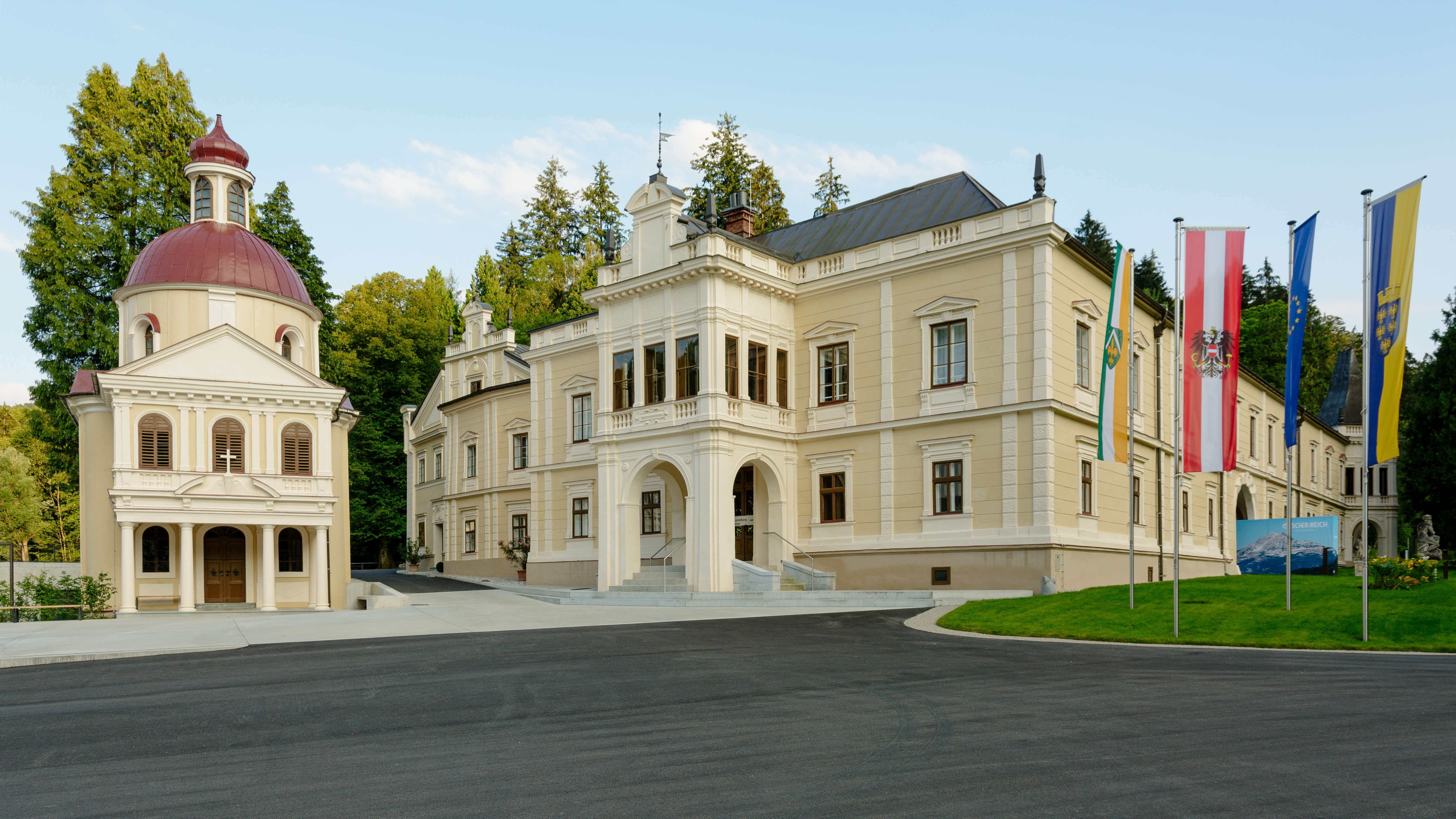 Schloss und Kapelle ehem. Töpperwerk Neubruck